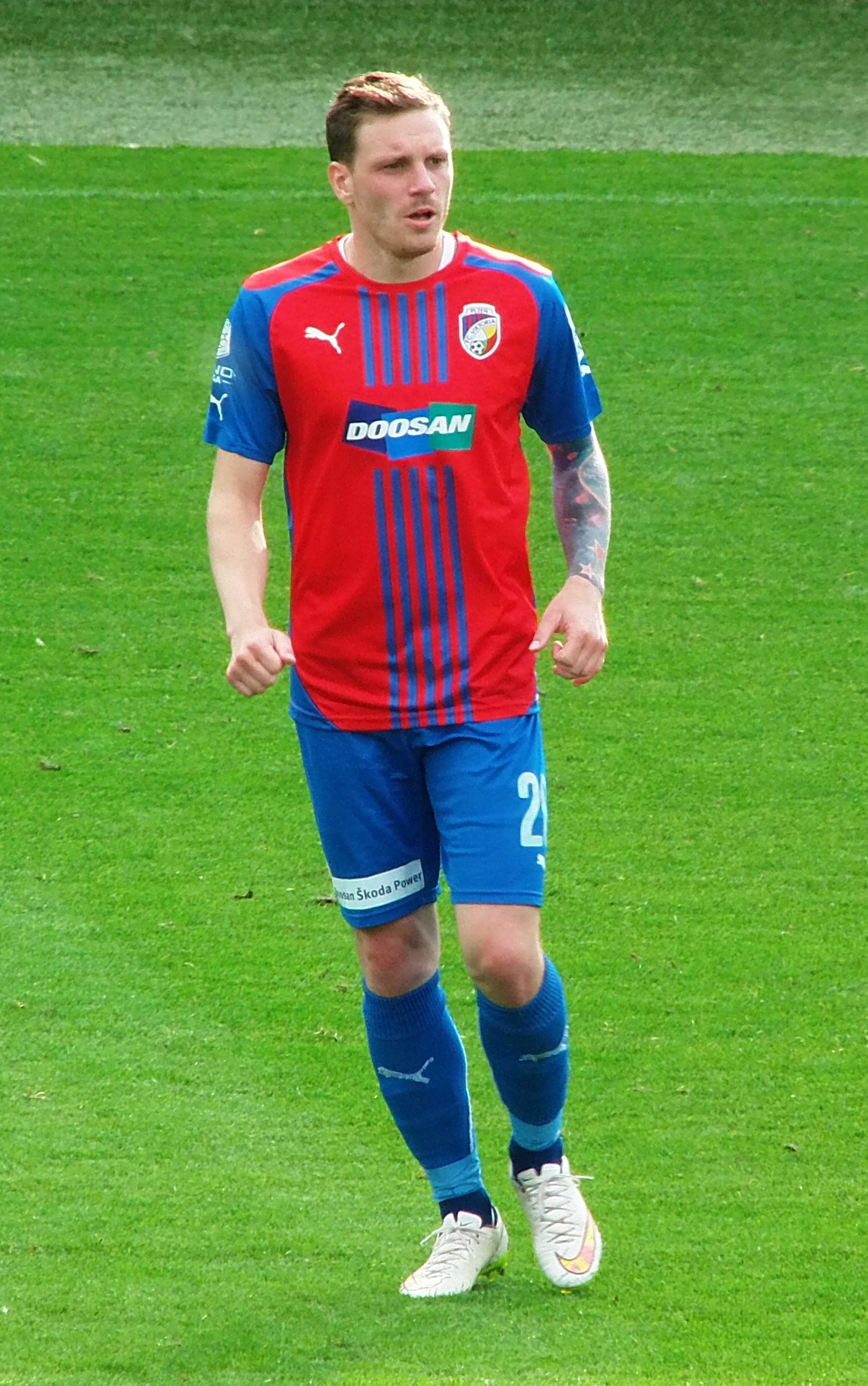 Ondřej Vaněk - květen 2015